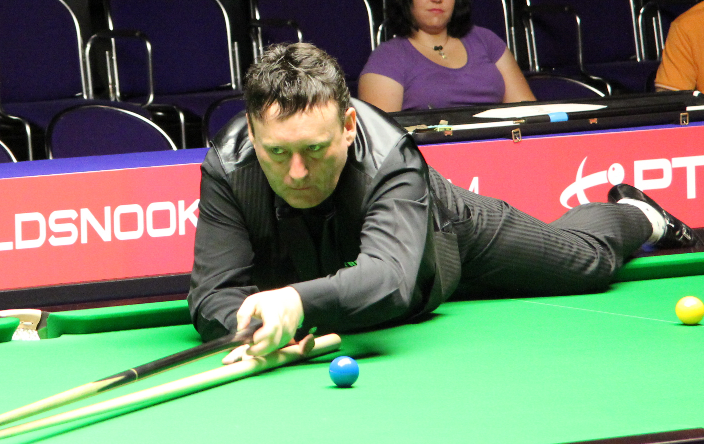 Jimmy White beim Paul Hunter Classic 2011